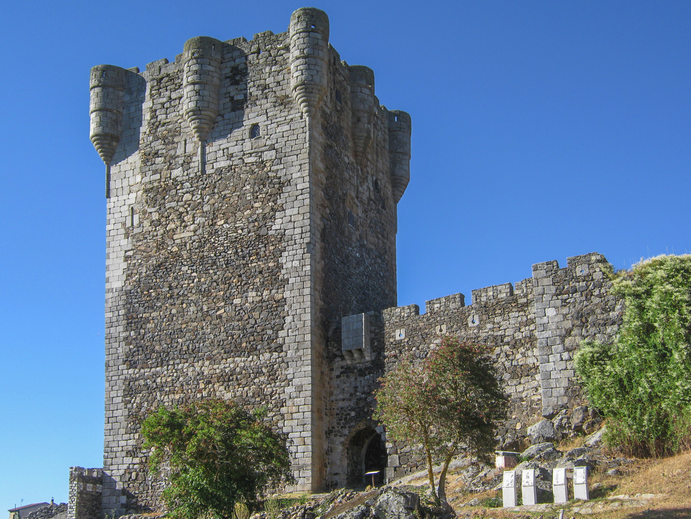 Castillo de Monleón y puerta de Coria, en la localidad de Monleón, parte del antiguo Reino de León